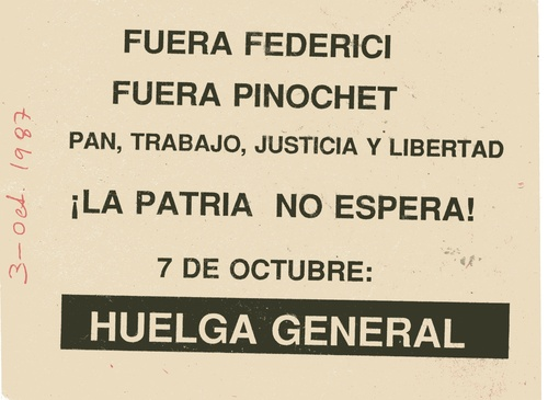 Folleto contra José Luis Federici, rector de la Universidad de Chile y Augusto Pinochet, presidente de Chile.